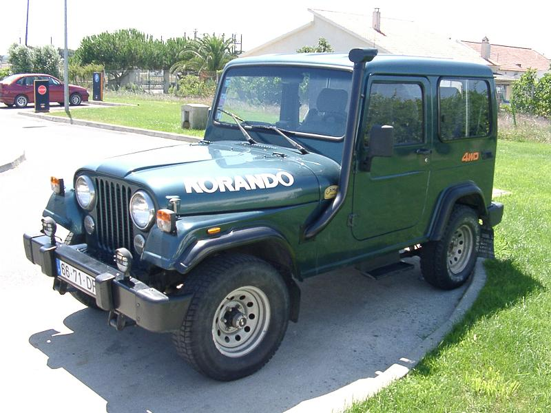 SsangYong Korando K4D